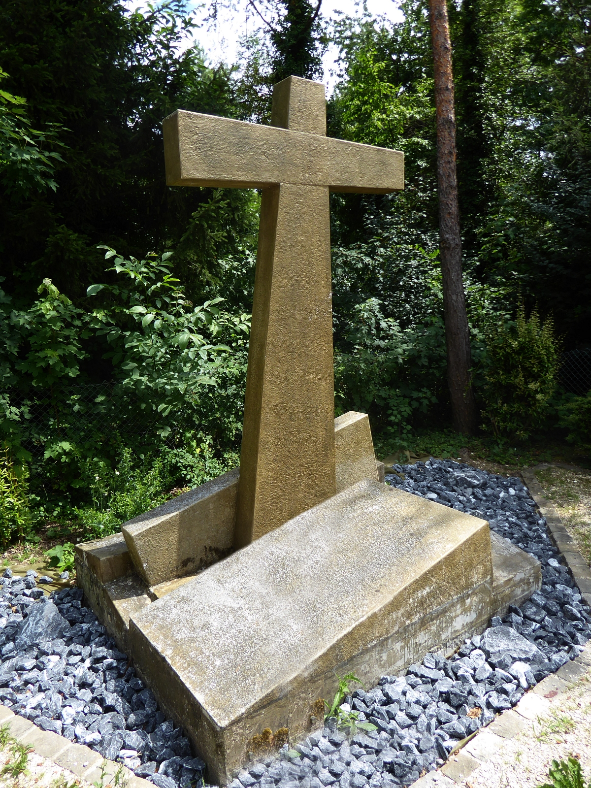 Erdbebenkreuz. Zum Gedenken an das Erdbeben 18. Oktober 1356. Standort, Krummenrainweg, Reinach. Graf Walram III. von Thierstein-Pfeffingen (auch Walram oder Walraff von Thierstein).